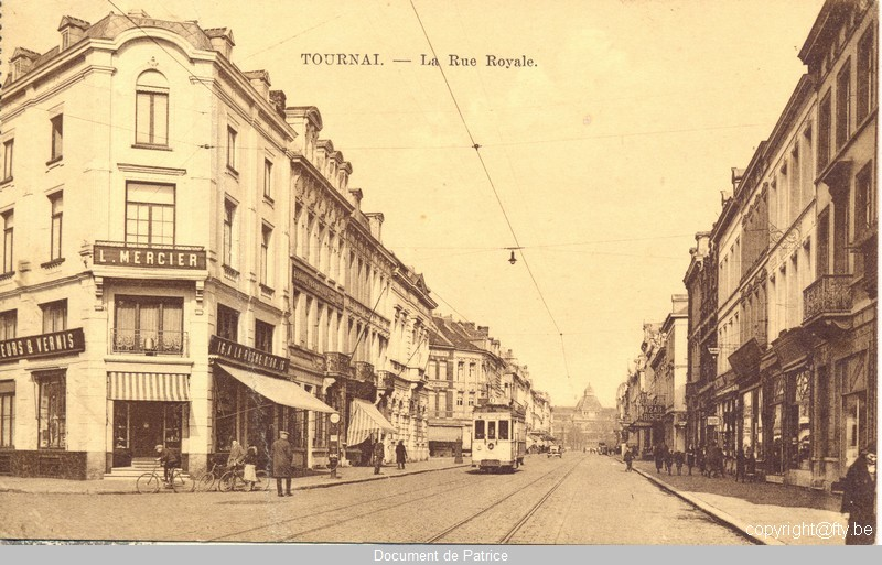 Carte postale Titre : TOURNAI. - La Rue Royale. Description : Motrice électrique (probablement la 9925 ou une similaire) sur la ligne O rue royale à Tournai.